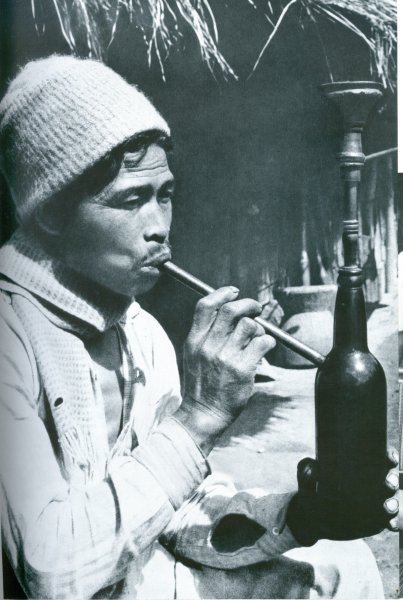 Khasi man